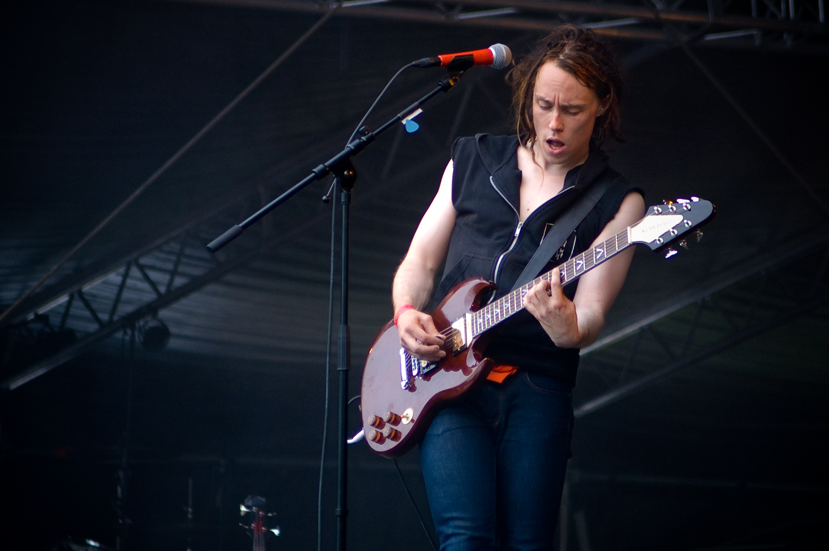 Ville Malja, Lapkon kitaristi Ruisrockissa 2007